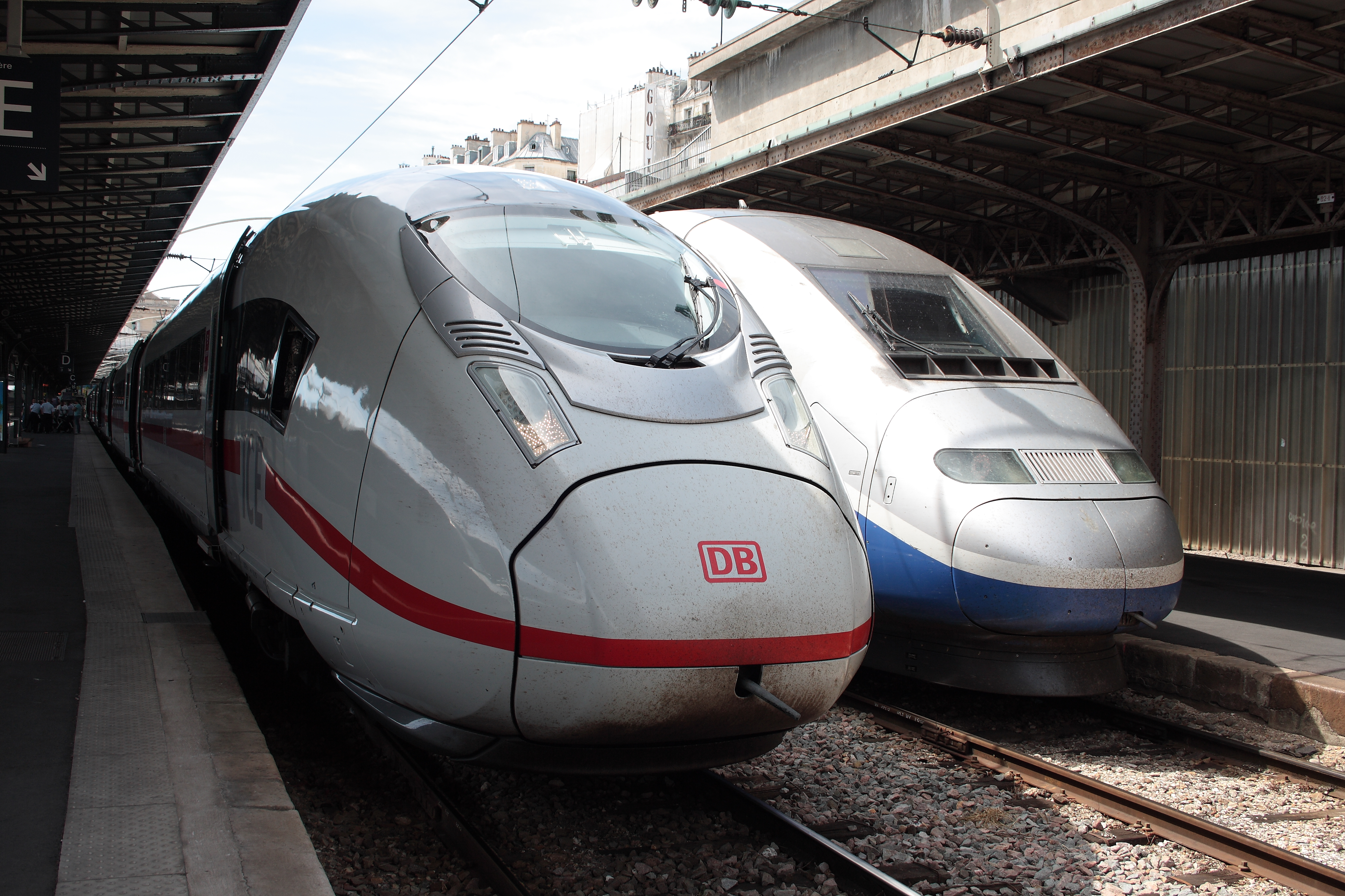 Rame DB 407, assurant un ICE vers Francfort-sur-le-Main, stationnée sur la voie 3.